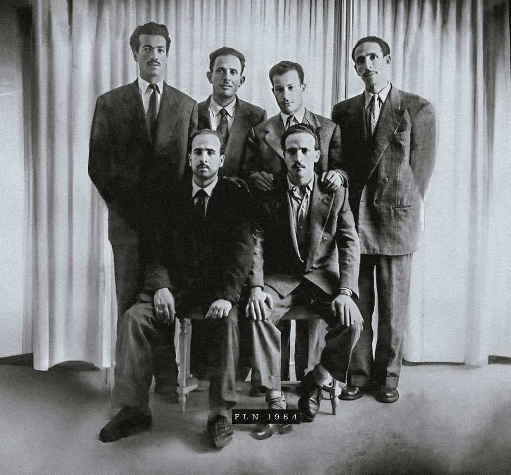 Six chefs du FLN avant le déclenchement de la «Revolution du 1er novembre 1954 ». Debouts, de gauche à droite : Rabah Bitat, Mostefa Ben Boulaïd, Didouche Mourad et Mohammed Boudiaf. Assis : Krim Belkacem à gauche, et Larbi Ben M'Hidi à droite.